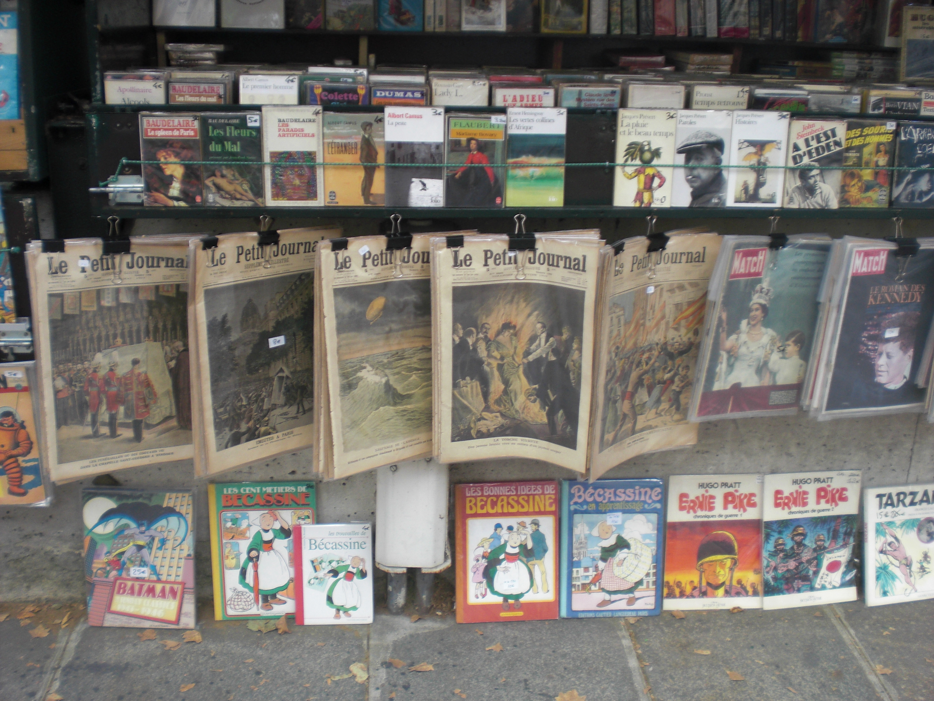 le petit journal en bukinistoj